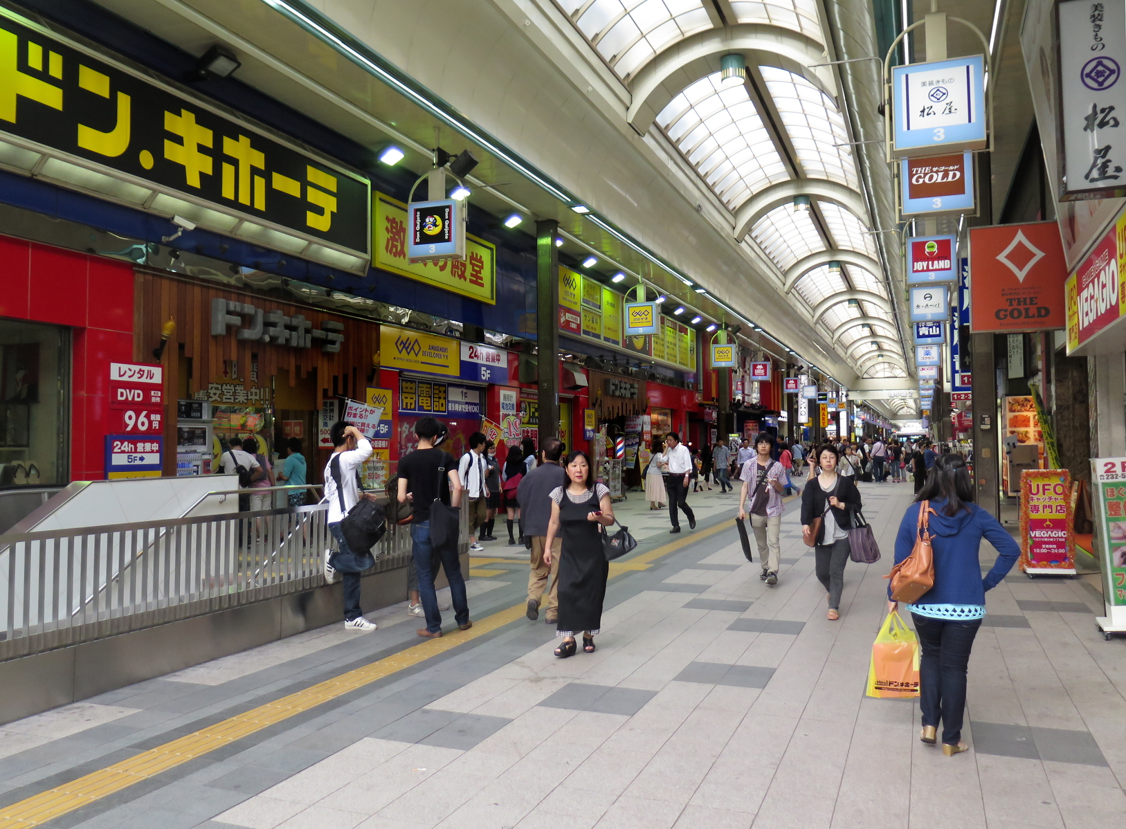 Tanuki Koji Shopping Arcade Shops